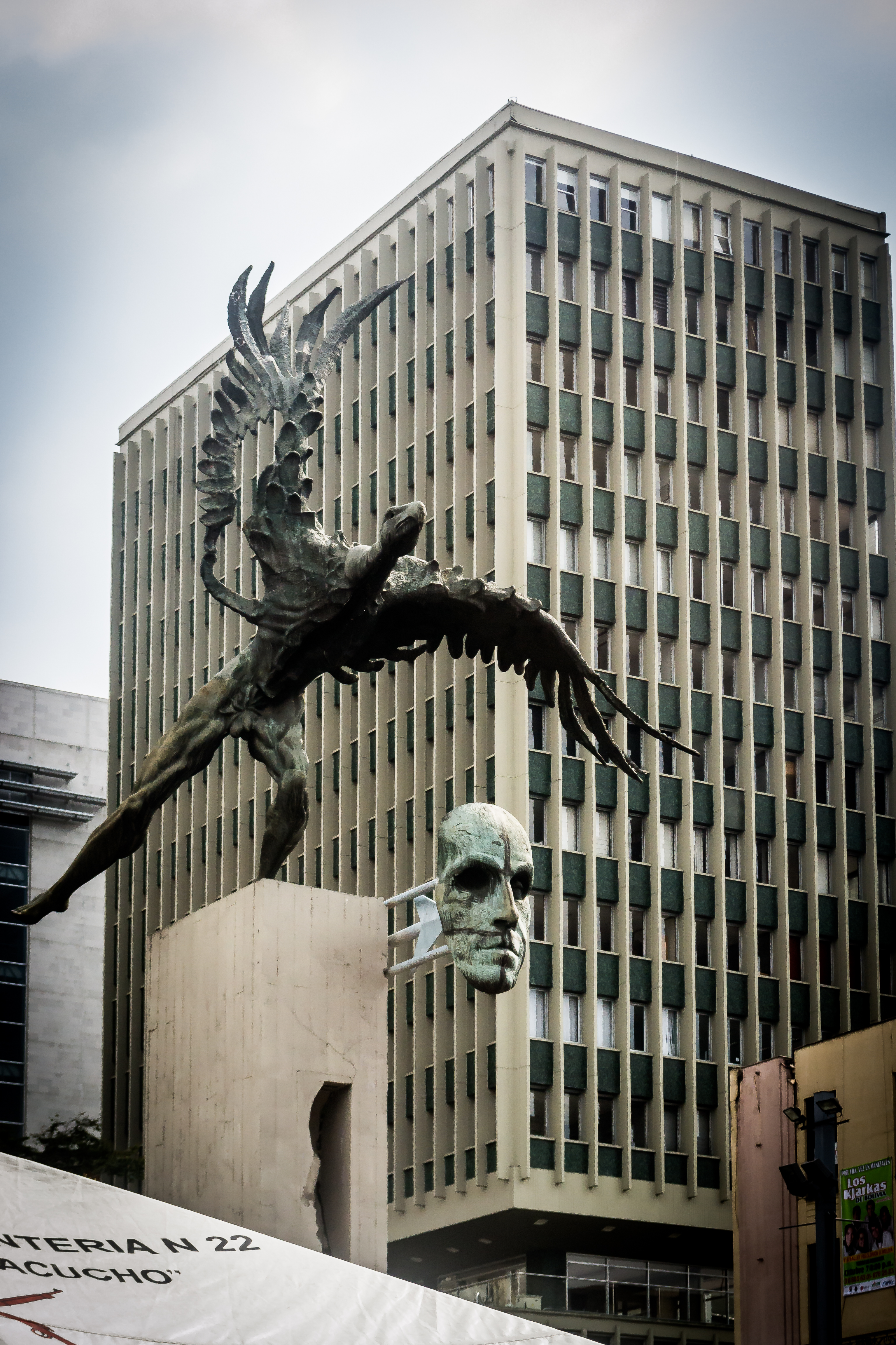 Bolivar Condor Manizales